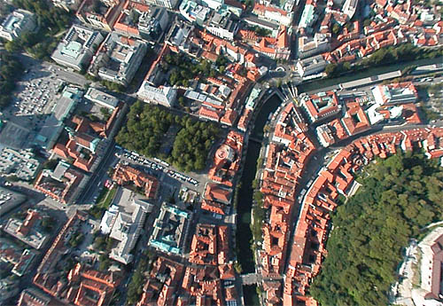 Nsvpična zračna fotografija nad starim mestnim jedrom Ljubljane